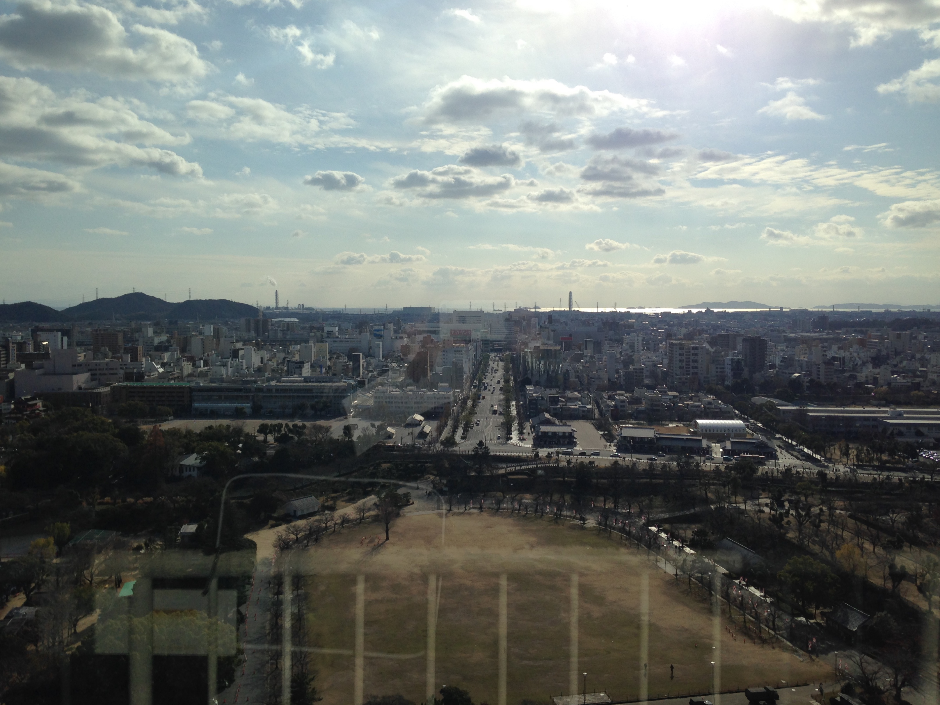 姫路城天守閣より南を眺める(奥は瀬戸内海、右奥は家島諸島)